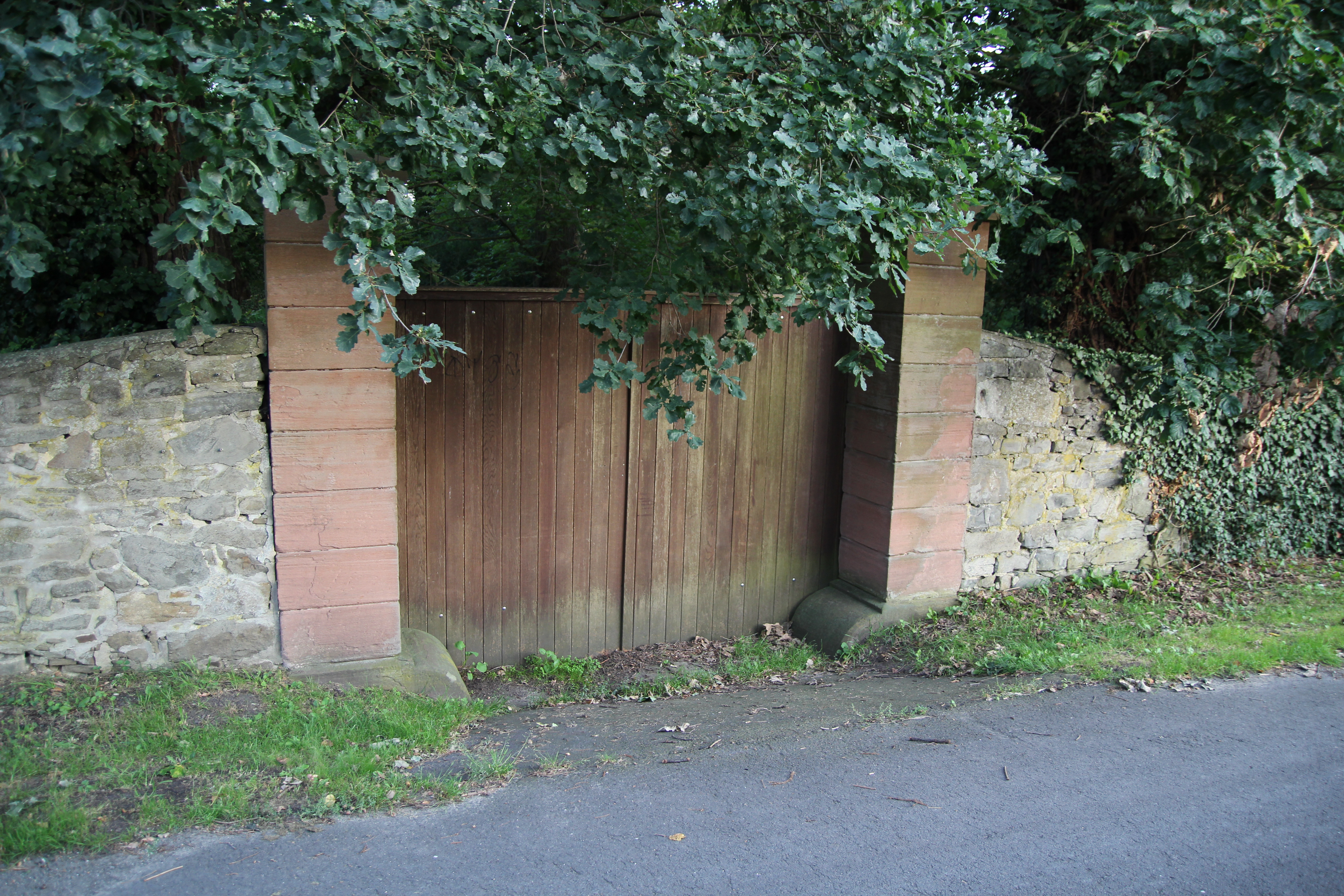 Nathusius Familienfriedhof Althaldensleben, Einfahrt